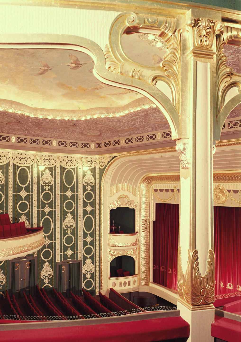 Blick vom Balkon in den Zuschauerraum des Kurtheaters in Bad Kissingen; an der Decke das Gemälde "Zug der Kraniche"